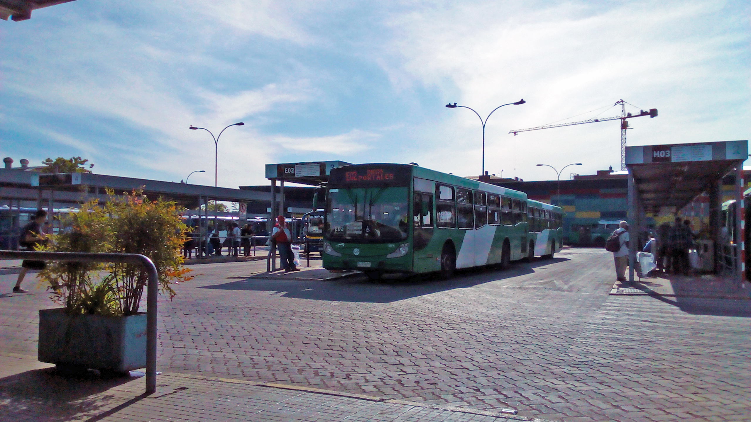 Vista parcial de andenes de la Estación Intermodal Lo Ovalle